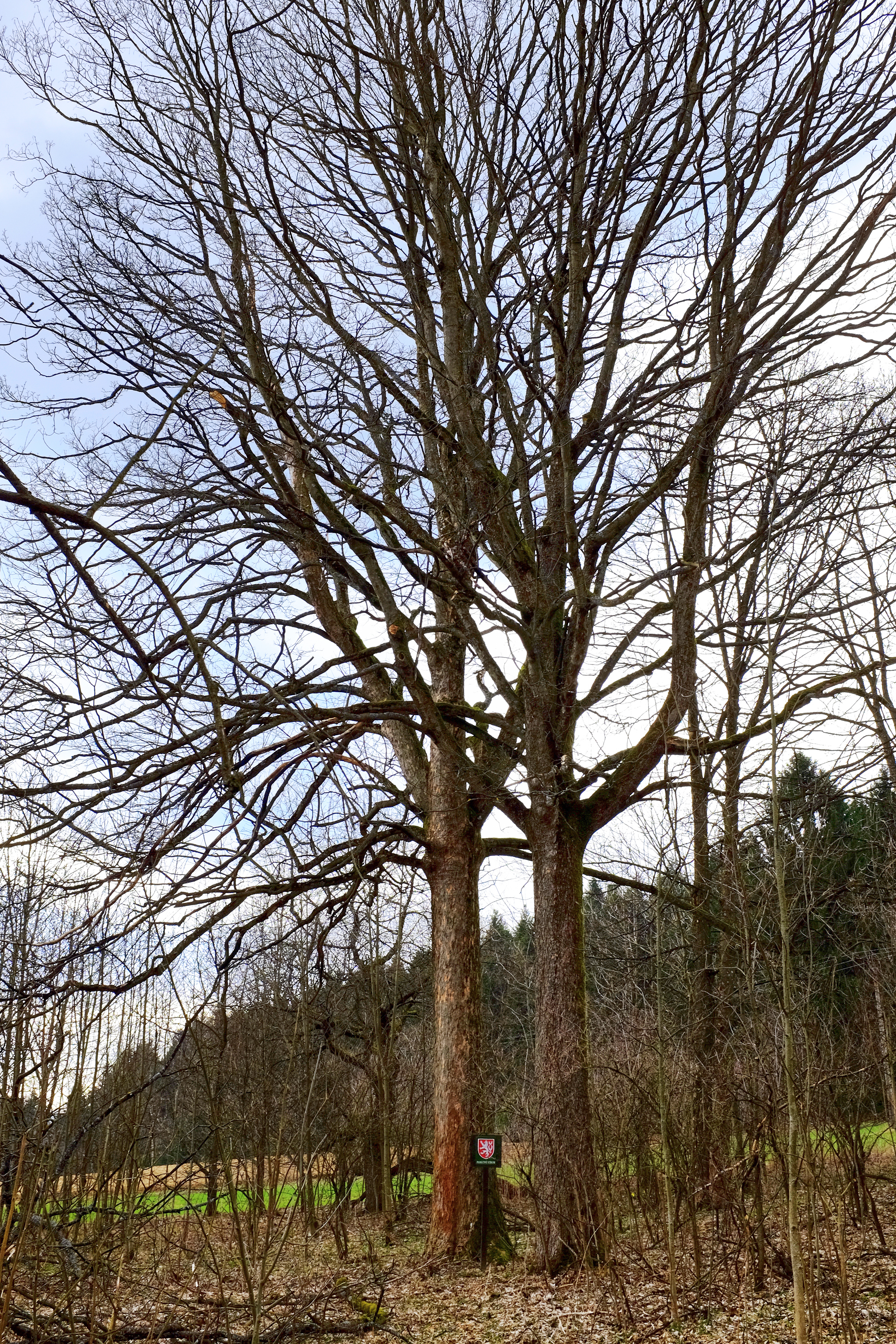 Památný strom - Štítarský klen - v zaniklé obci Štítary (u Aše), okres Cheb